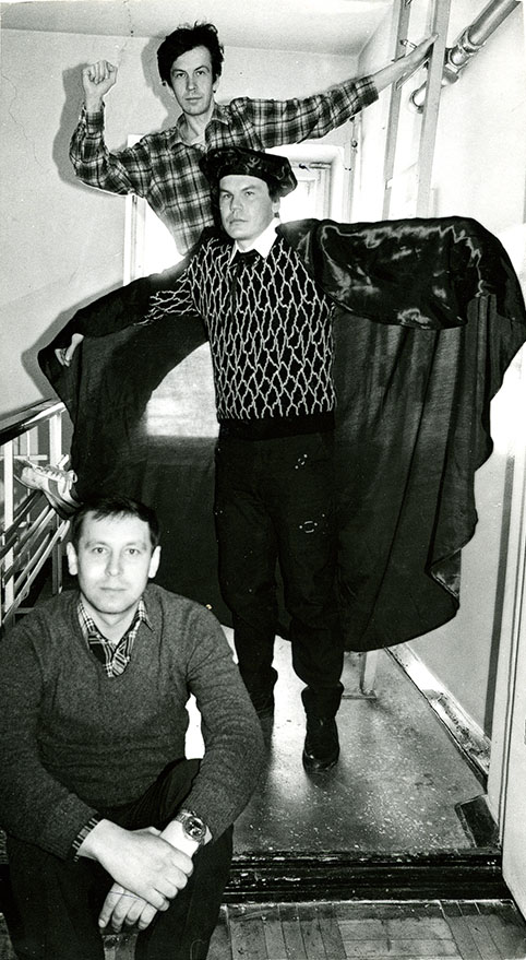 В центре — Юрий Беликов (в алтайской мантии "Махатмы российских поэтов"). Над ним — Владислав Дрожащих. Внизу — Юрий Асланьян. Лестничная площадка редакции пермской газеты "Молодая гвардия". 1989 год.